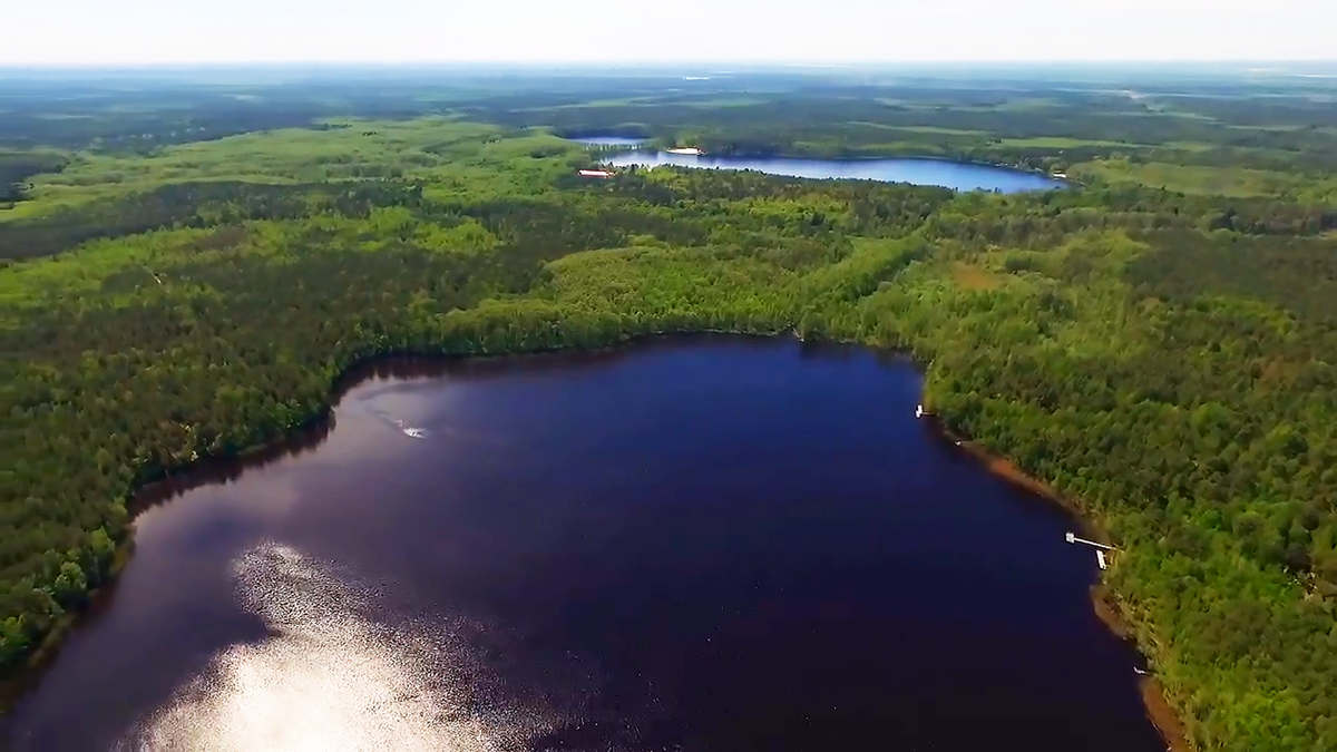 Брестская группа озер